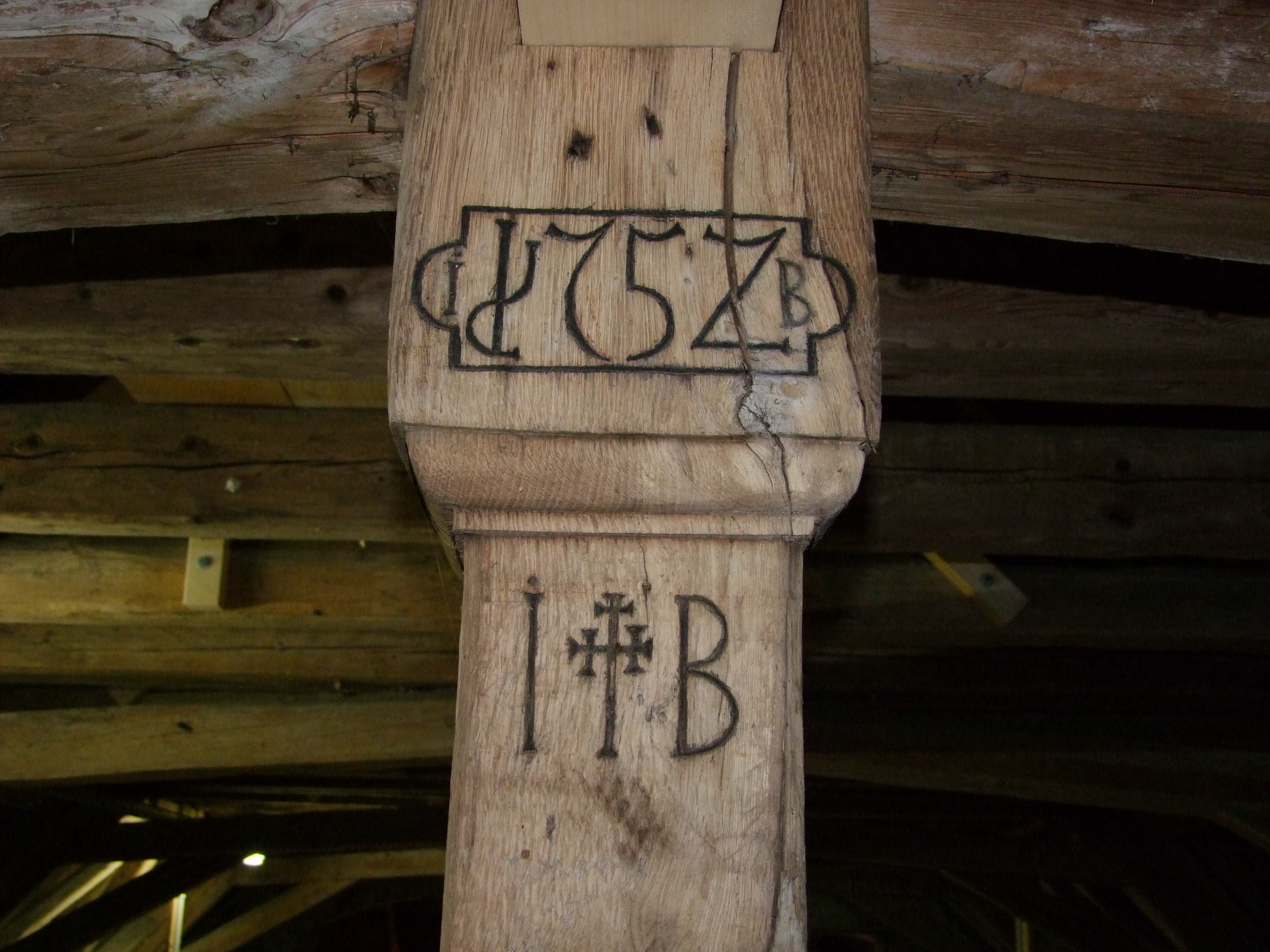 Die Alte Turmuhr der Kirche St. Agatha in Dickenreishausen. - OpenStreetMap (Info)